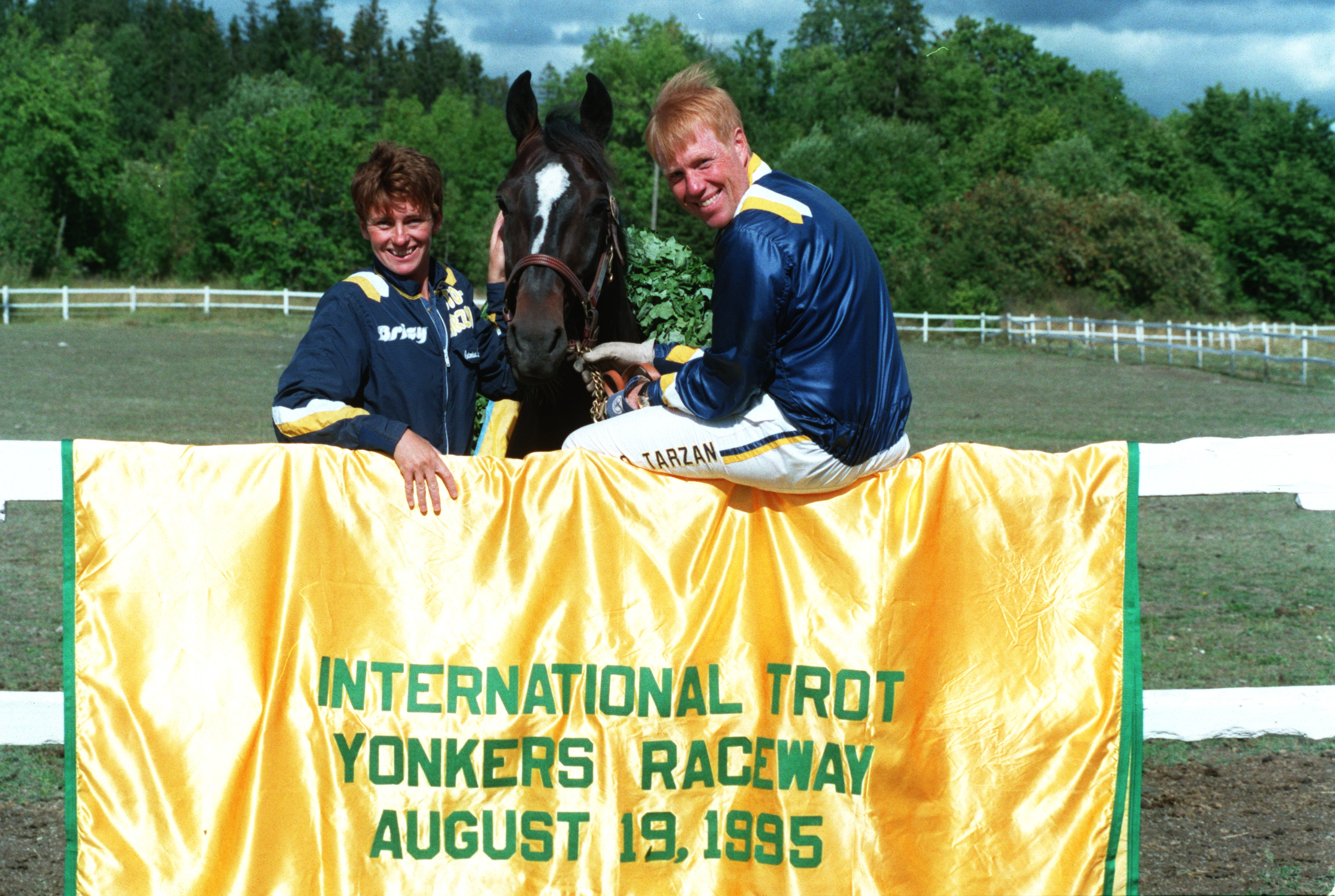 Duon vid staket med VM-täcke 1995. Fotograf: Kanal 75